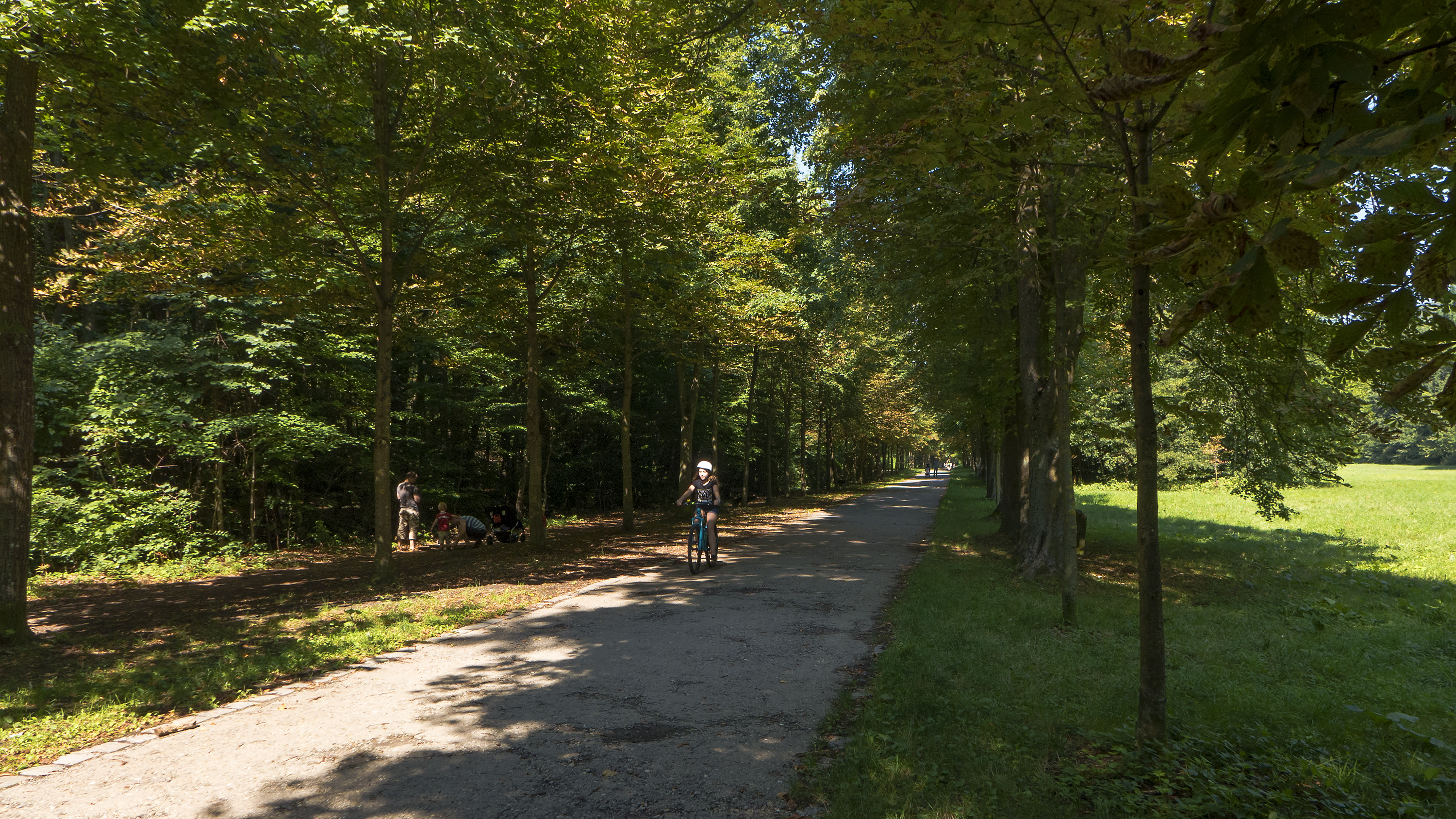 Schwarzenbergpark in Wien 17, Schwarzenbergallee